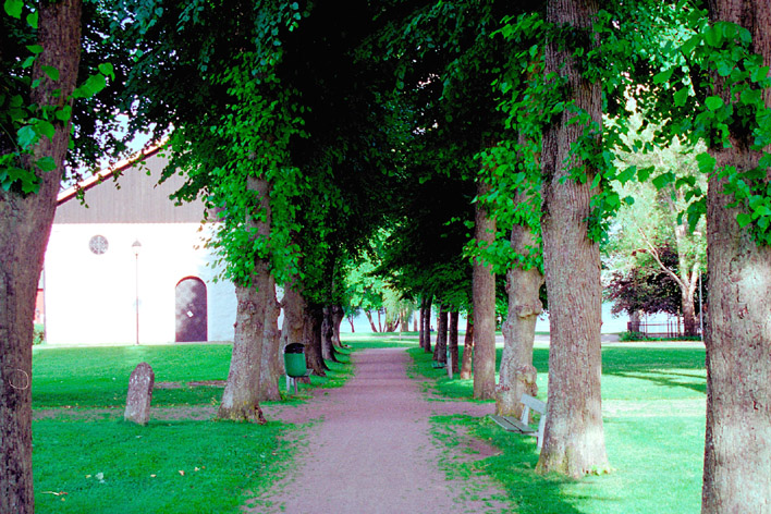 Åmål (Schweden), GNU-FDL (selbst fotografiert)